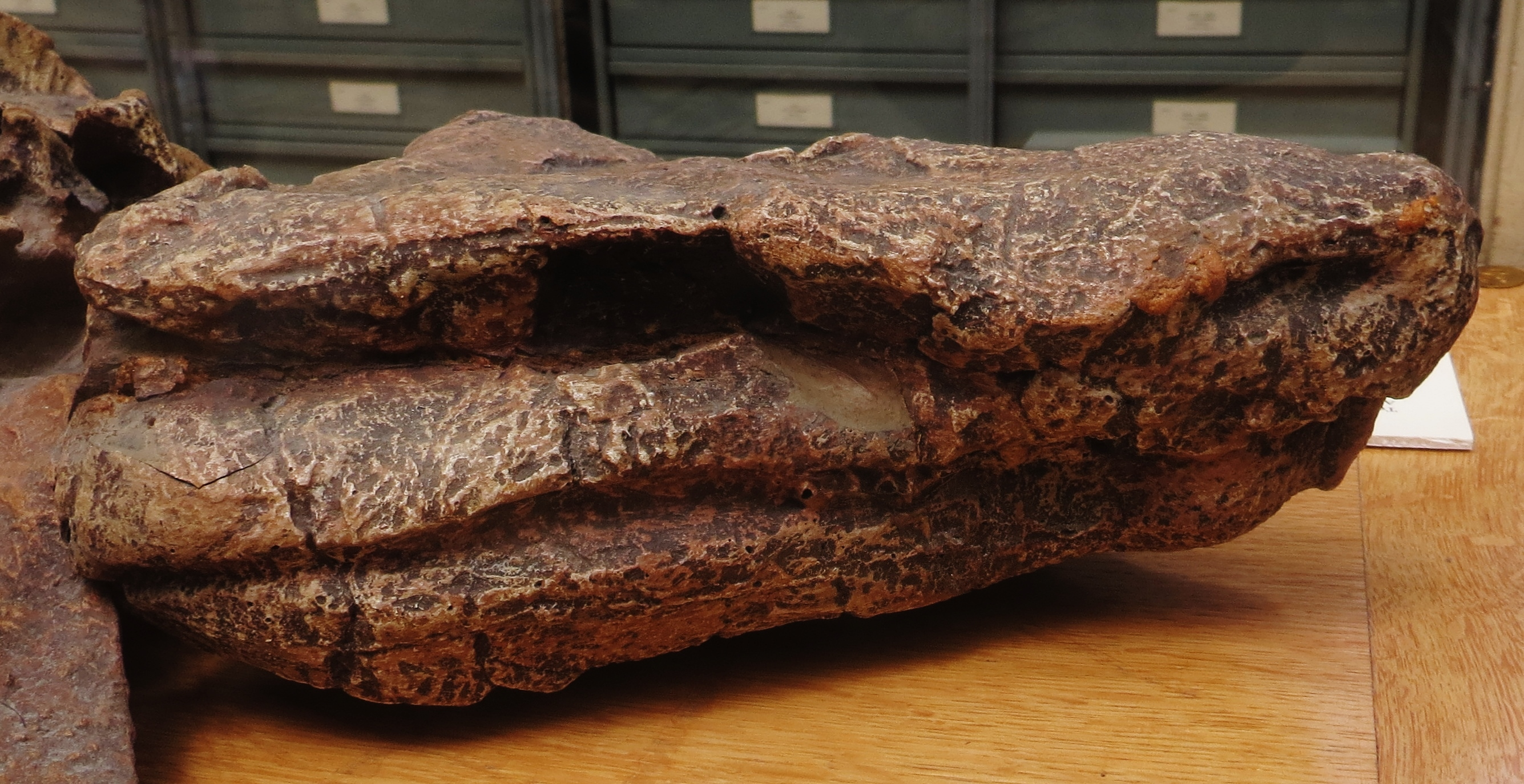 Limnoscelis fossil